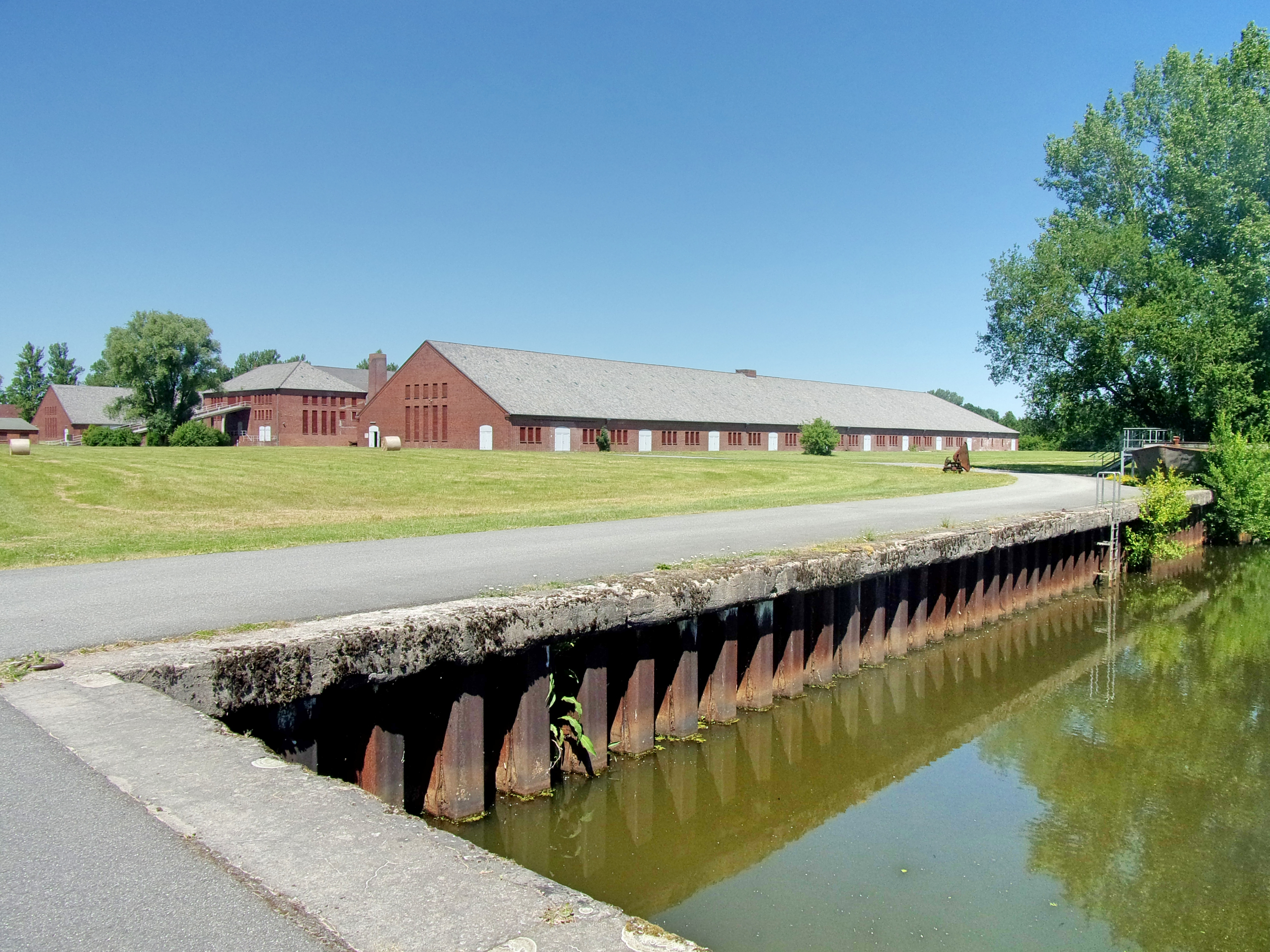 Klinkerwerk der Gedenkstätte Neuengamme in Hamburg am heutigen Neuengammer Stichkanal. Das Foto entstand bei einer Radtour mit dem Wikipedia-Kontor-Hamburg. This is a photograph of an architectural monument.